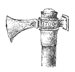 grafika do książki